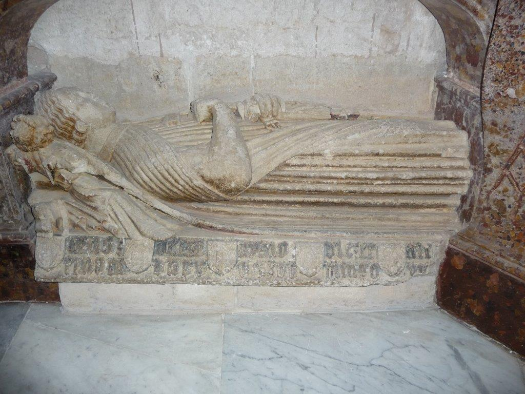 Sepulcro del conde Sancho de Castilla (1342-1374), que fue hijo ilegítimo del rey Alfonso XI de Castilla y de Leonor de Guzman. Se encuentra en la capilla mayor de la catedral de Burgos, y junto al conde fue sepultada su esposa, la condesa Beatriz de Portugal (1347-1381), que era hija del rey Pedro I de Portugal y de su amante Inés de Castro.